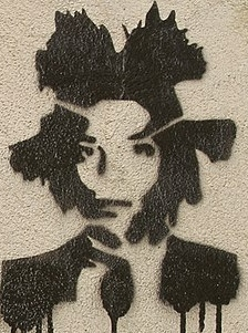 Dripping